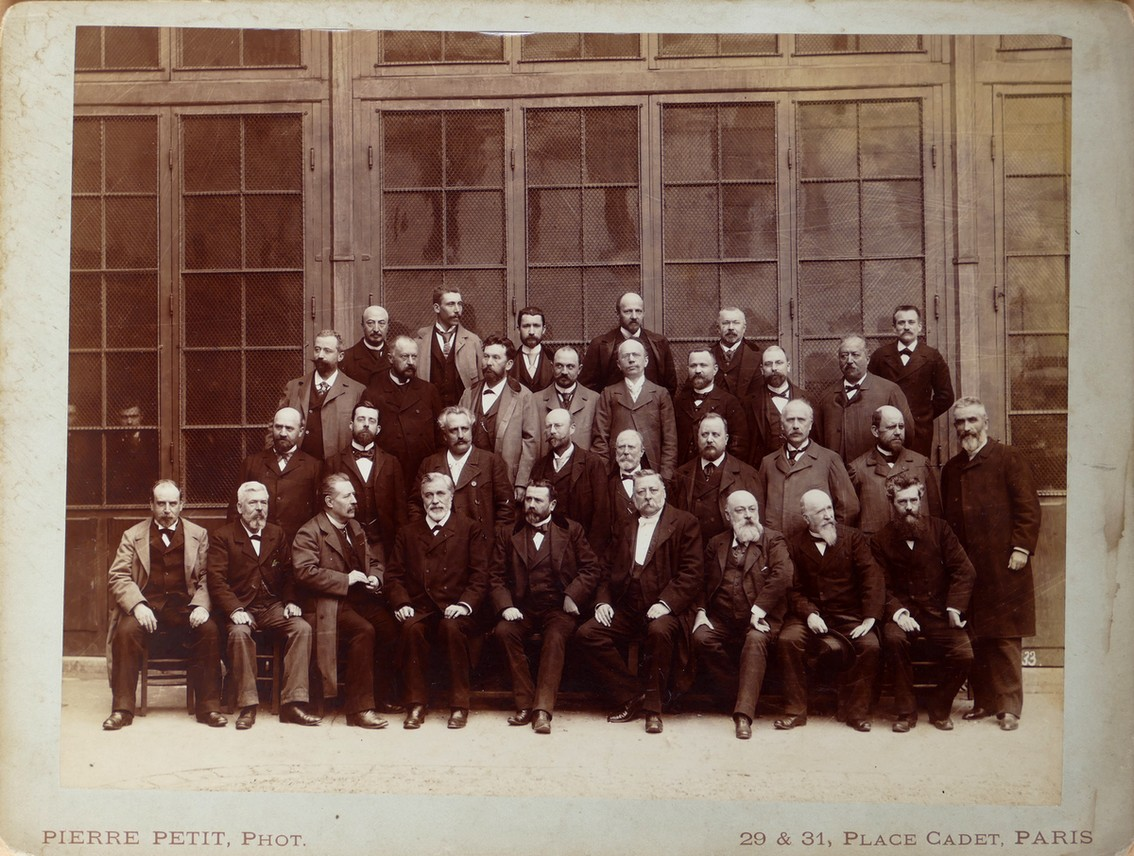 Le corps enseignant du lycée Condorcet (Paris, 8e arrond.) vers 1885. Photo de Pierre Petit, dimension du carton 29 x 22 cm. Collection personnelle. Proviseur Julien Girard (1er rang au centre), Georges Colomb (dernier rang à droite, part en 1885), Alphonse Darlu (avant dernier rang, 2ème à droite, arrive en 1885), Alphonse Ducatel (2ème rang, 2ème à gauche), Eugène Lintilhac (3ème rang, premier à gauche).